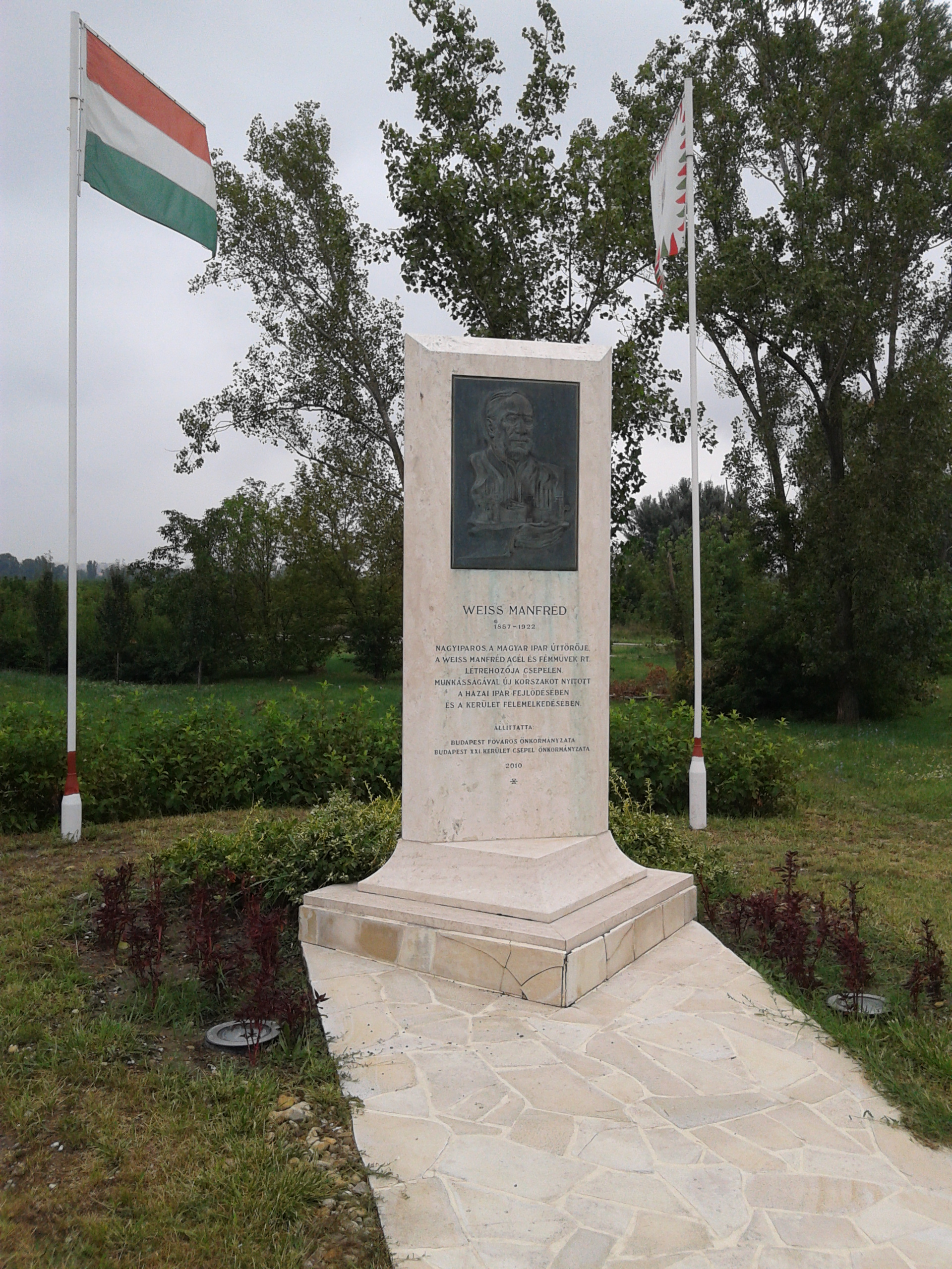 Weiss Manfréd tiszteletére elhelyezett alkotás a Csepel-sziget bejáratánál, Szórádi Zsidmond alkotása